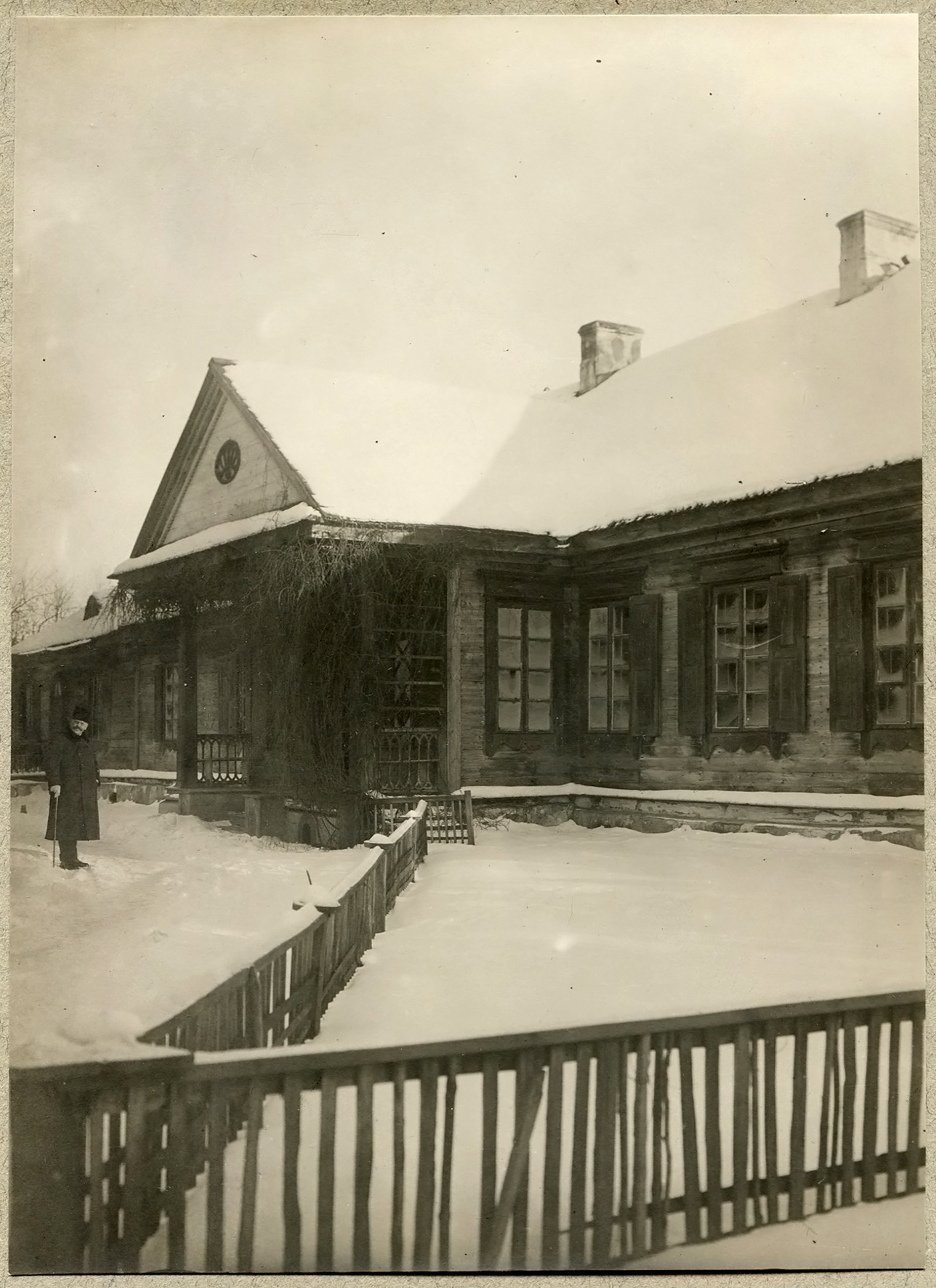 Беларуская (тарашкевіца): Замосьце (Zamoście), сядзіба Ельскіх (Jelski)